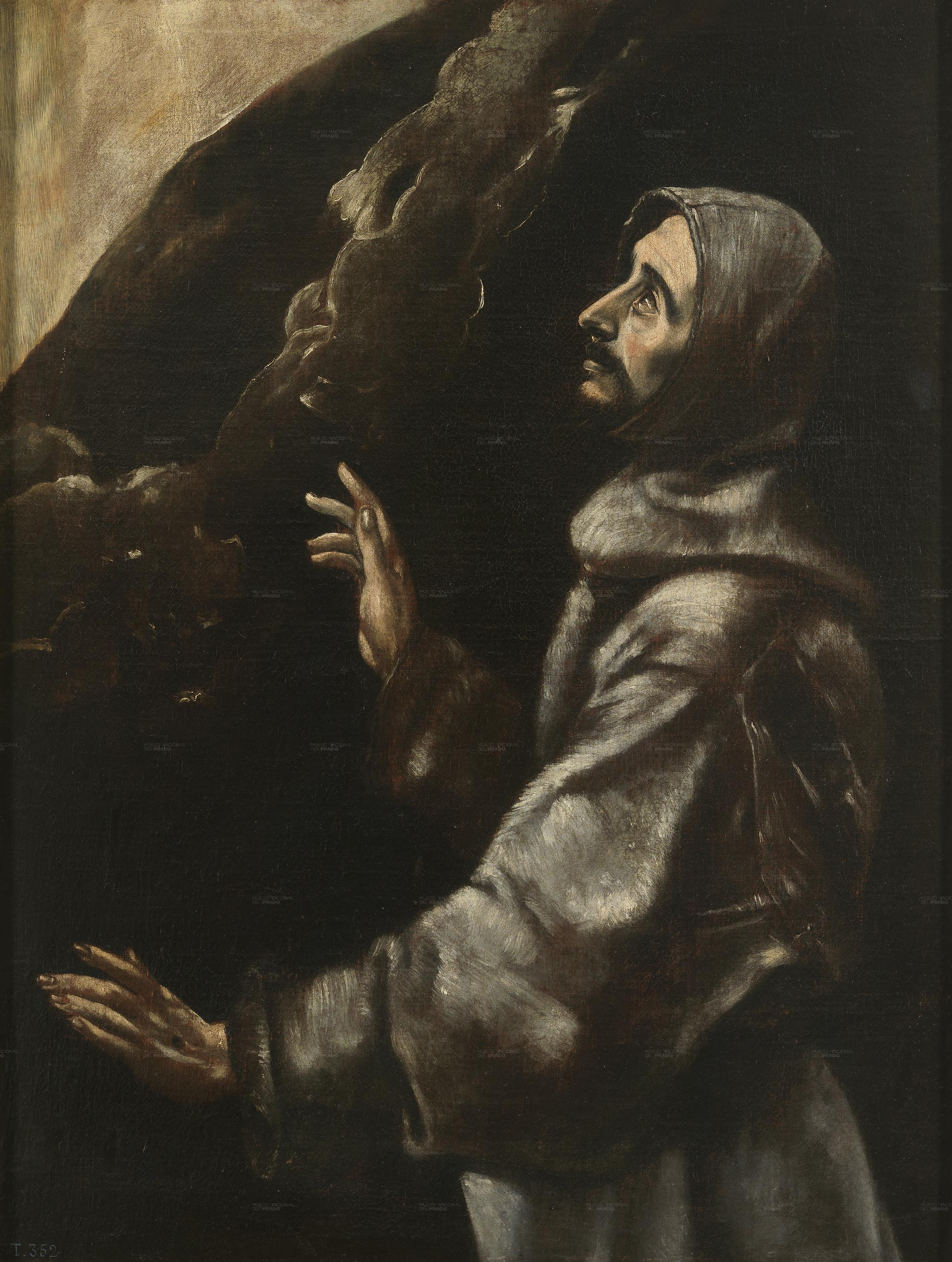 La obra representa a San Francisco de Asís, fundador de la Orden de los franciscanos, en actitud extática.